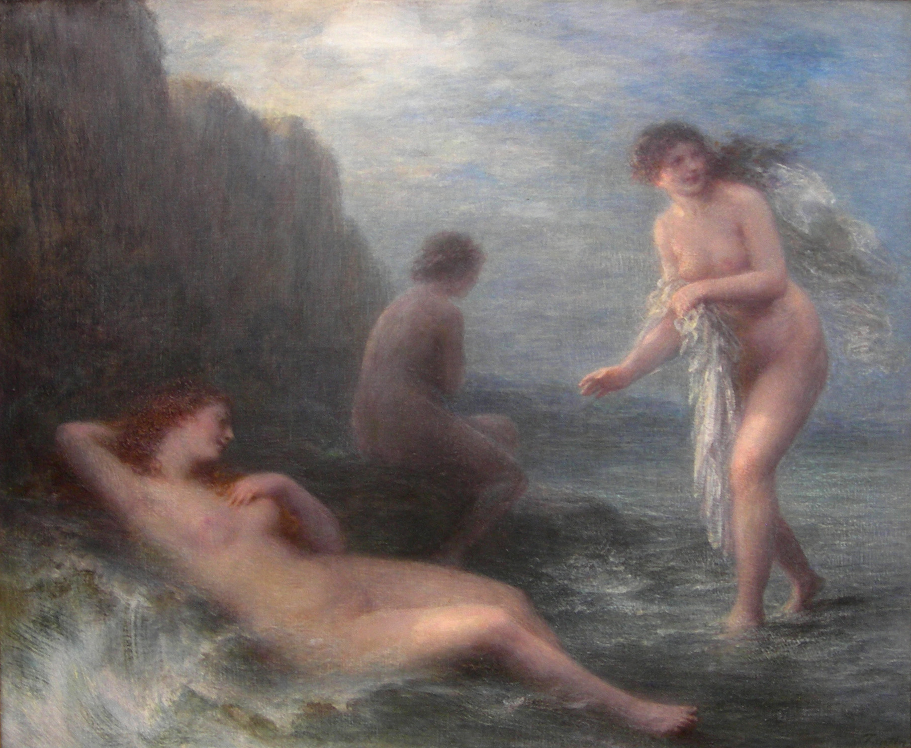 Le Soir, conservée au Musée d'Art et D'Industrie de Roubaix, France